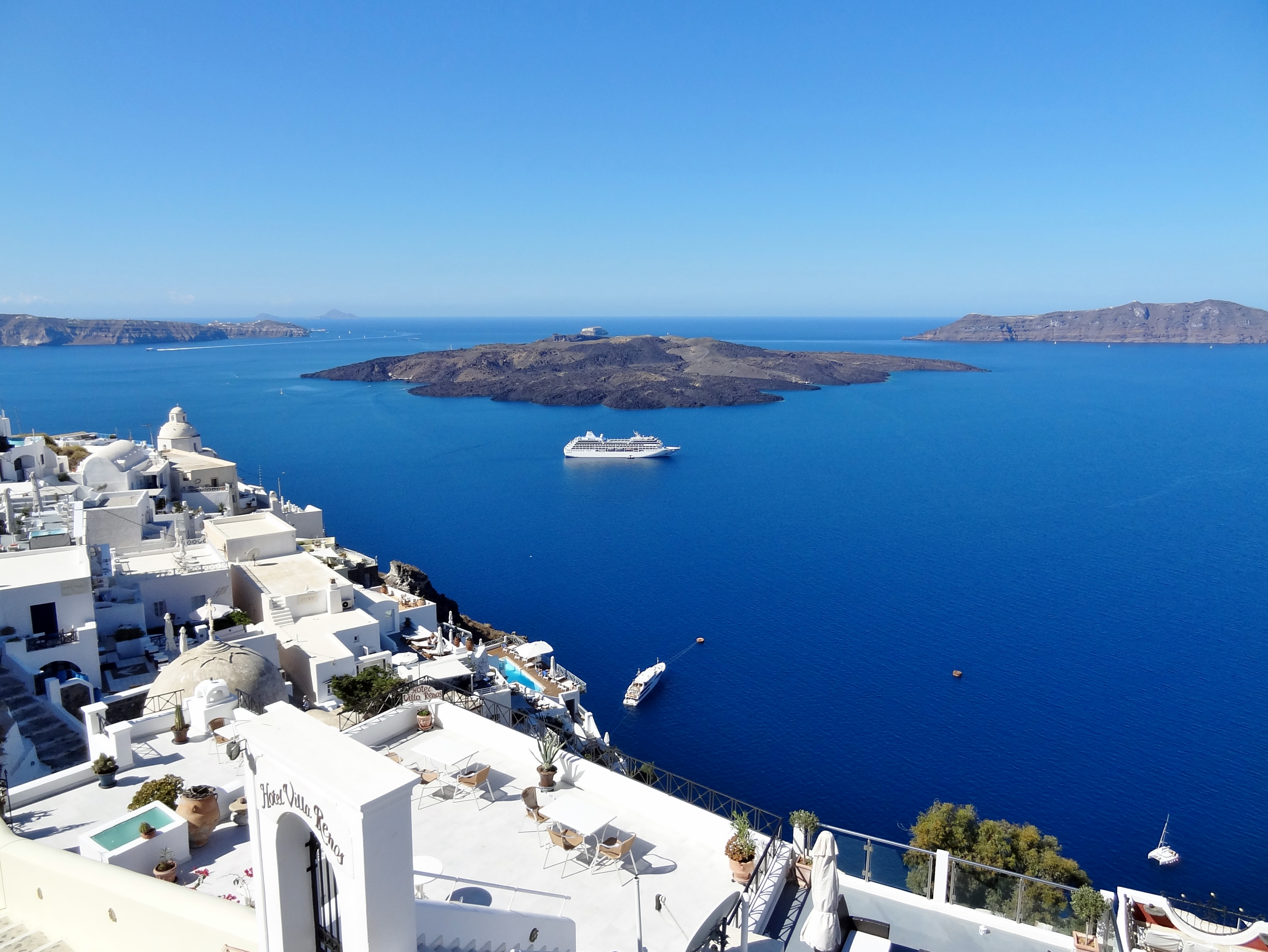 Fira an der Caldera von Santorin, Kykladen, Griechenland